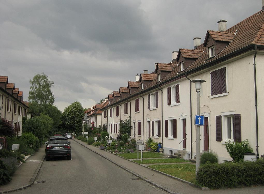 Wasserhaus Wohnsiedlung (1920-1921) in Münchenstein BL Switzerland, Architekt Hans Bernoulli